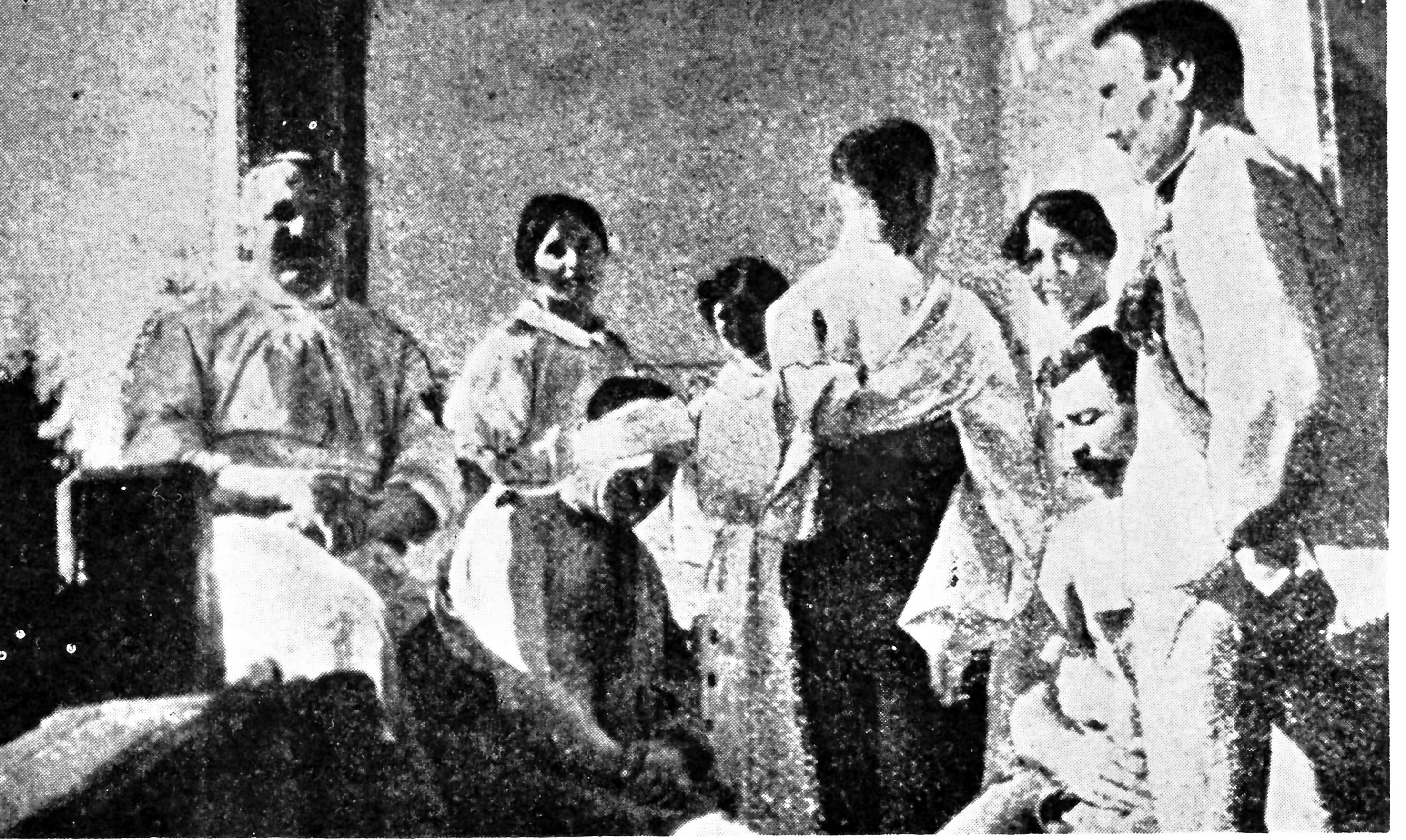 MUDr. Michal Guhr ( celkom vpravo) , lekár, propagátor turistiky a lyžovania vo Vysokých Tatrách , šéflekár v kúpeľoch Tatranská Polianka. Fotografia je z 1. sv. vony. Na snímke sú zranení vojaci, ktoré sa liečili v Tatranskej Polianke